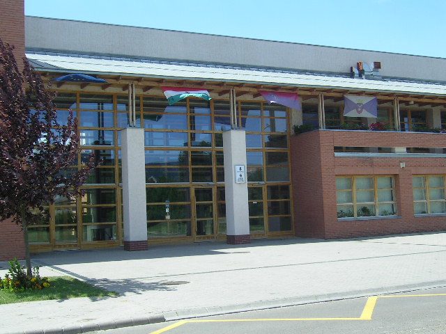 Boronkay György Középiskola főbejárata, Vác (Németh László u.)